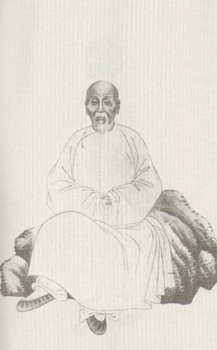 沈曾植，清朝學者。Shen Zengzhi